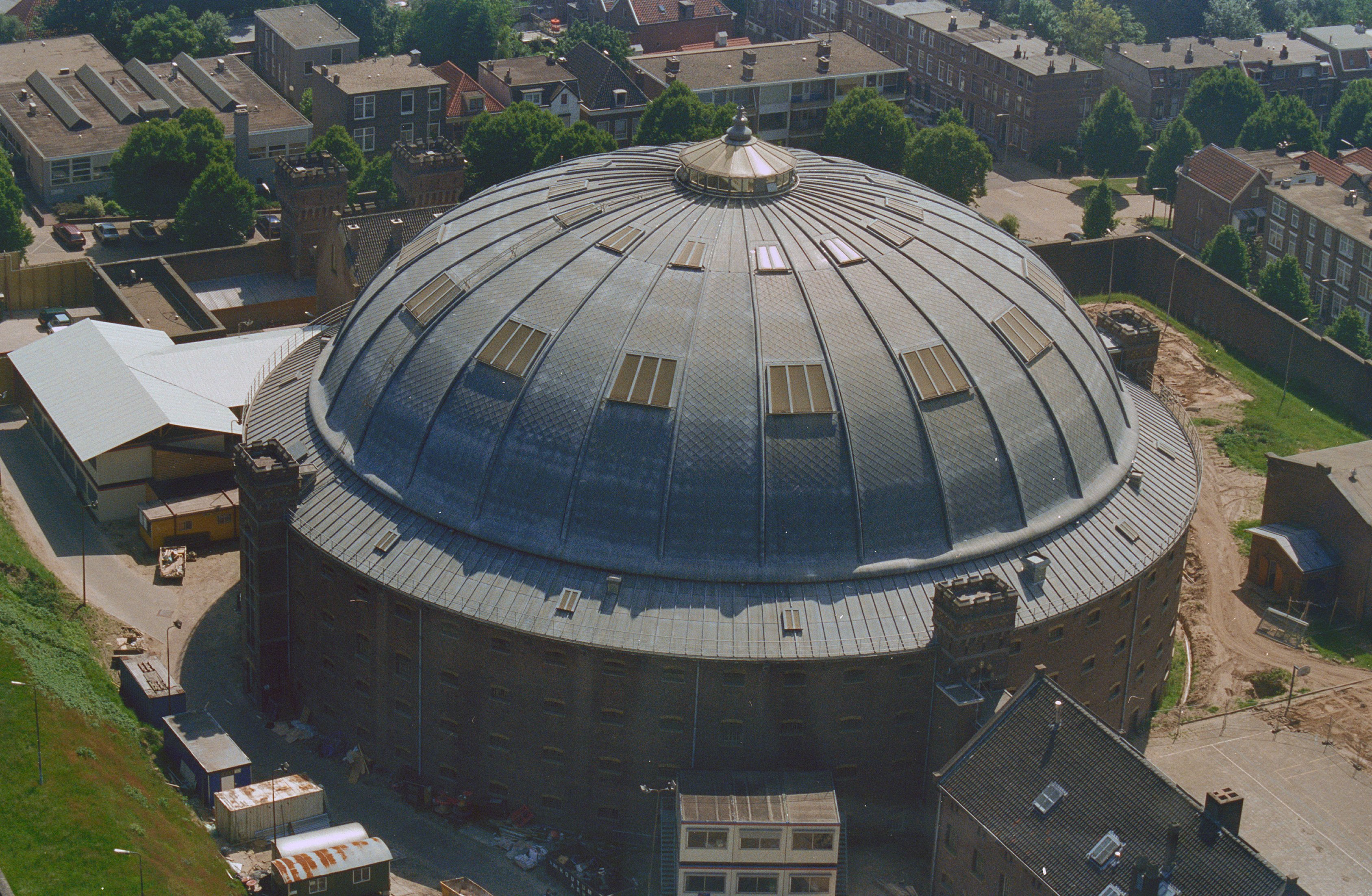 Koepelgevangenis: Bovenaanzicht vanaf zendmast (opmerking: Gefotografeerd voor Monumenten In Nederland Gelderland)